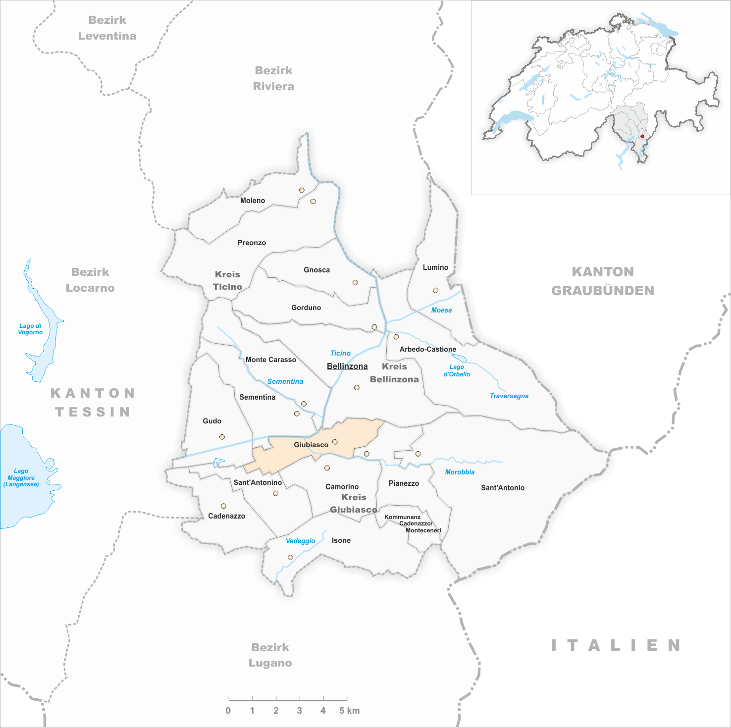 Municipality Giubiasco